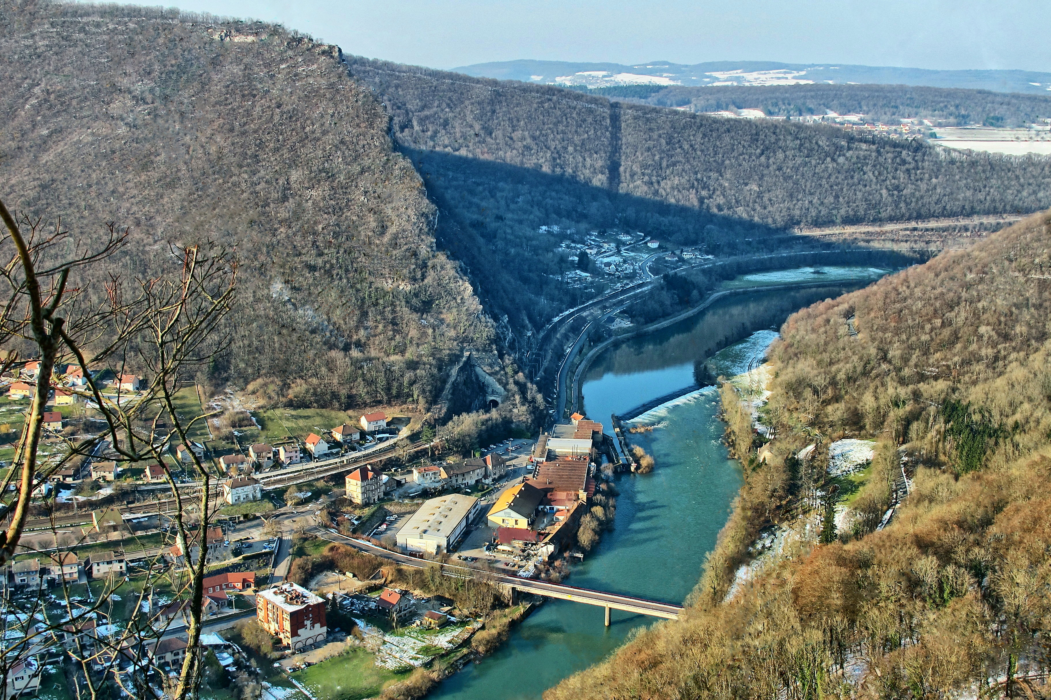 Vue sur Laissey depuis le château de Vaite